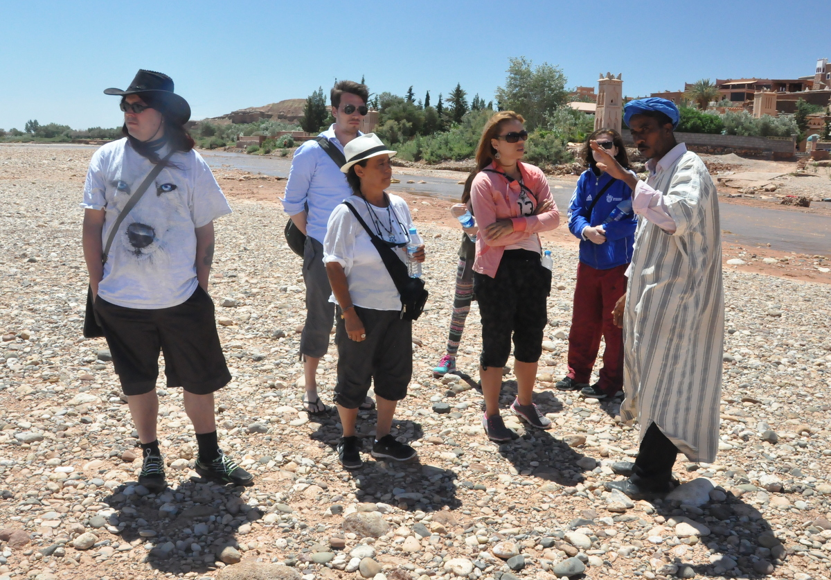 Aït Ben Hadou, turistas junto a guia local.